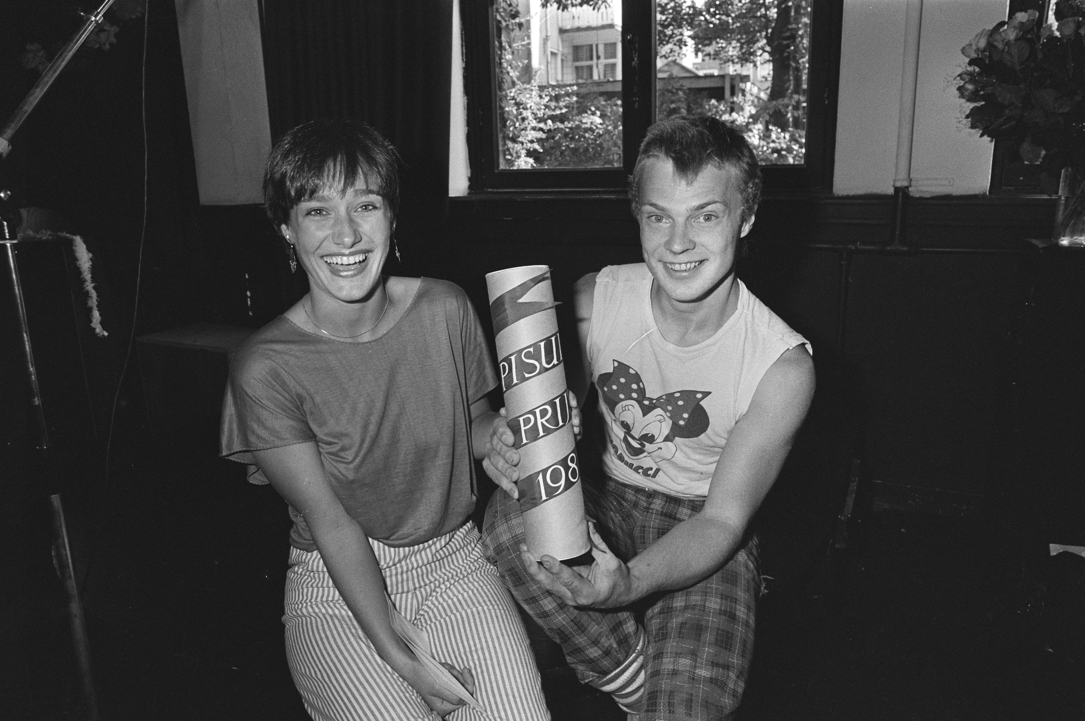 Collectie / Archief : Fotocollectie Anefo Reportage / Serie : Pisuisse-prijs 1981 in Akademie voor Kleinkunst in Amsterdam uitgereikt Beschrijving : Pieter Tiddens en Marloes van den Heuvel winnaars van de Pisuisse-prijs 1980 en 1981. De prijs die wordt uitgereikt op de Akademie voor Kleinkunst in Amsterdam voor de leerling, die de beste theaterprestatie heeft geleverd. Datum : 6 september 1981 Locatie : Amsterdam, Noord-Holland Trefwoorden : artiesten, leerlingen, onderscheidingen Persoonsnaam : Heuvel, Marloes van den, Tiddens, Pieter Fotograaf : Antonisse, Marcel / Anefo, [onbekend] Auteursrechthebbende : Nationaal Archief Materiaalsoort : Negatief (zwart/wit) Nummer archiefinventaris : bekijk toegang 2.24.01.05 Bestanddeelnummer : 931-6624